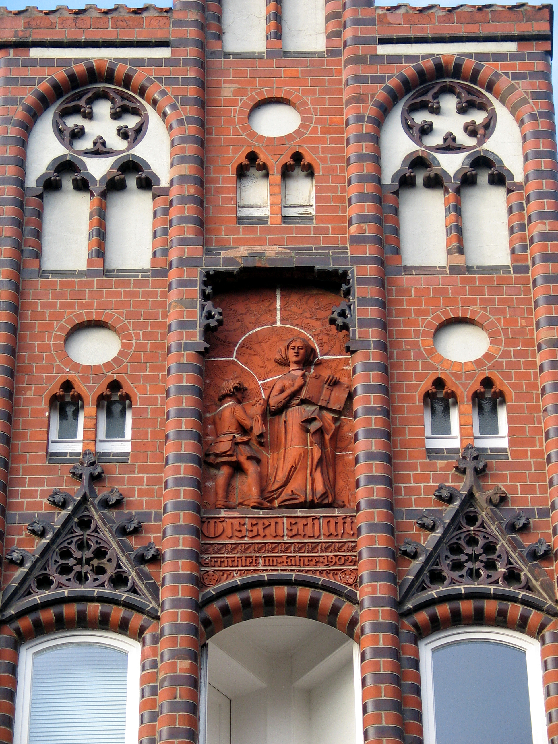 Terrakotta-Relief "Wissenschaft" am denkmalgeschützten Backsteingebäude Reinholdstraße 5 des Architekten Karl Mohrmann in Hannover-Nordstadt ...